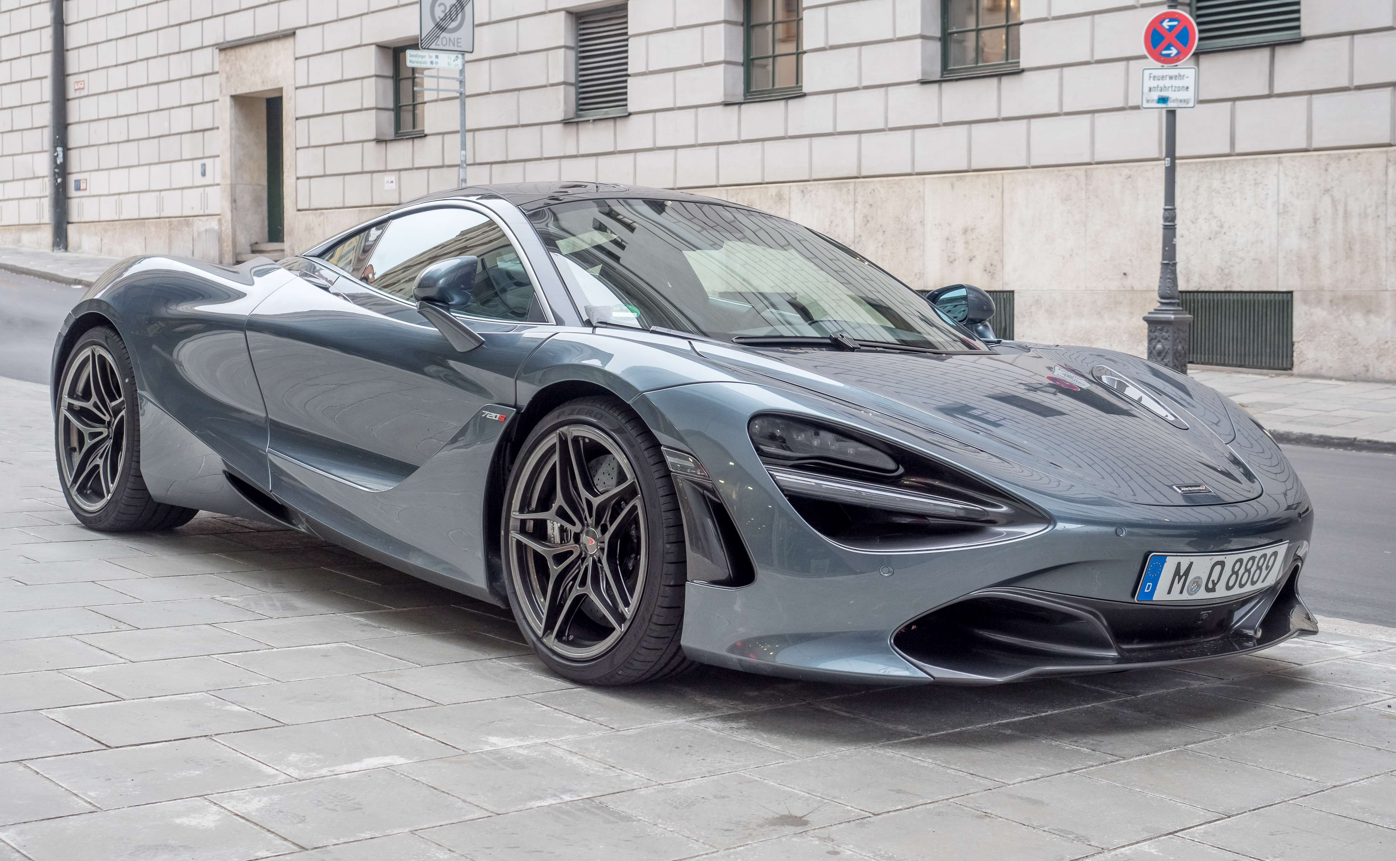 McLaren 720S in München